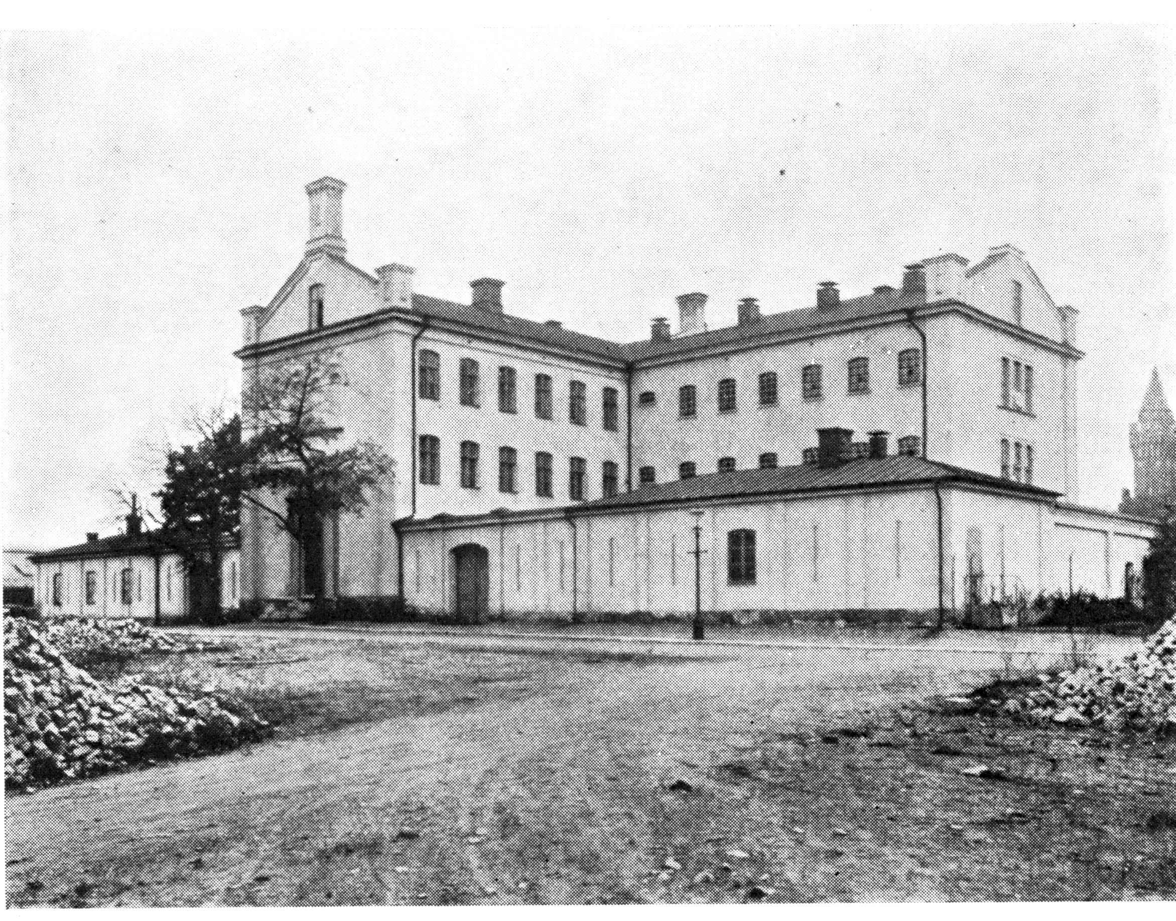 Länsfängelset i Jönköping